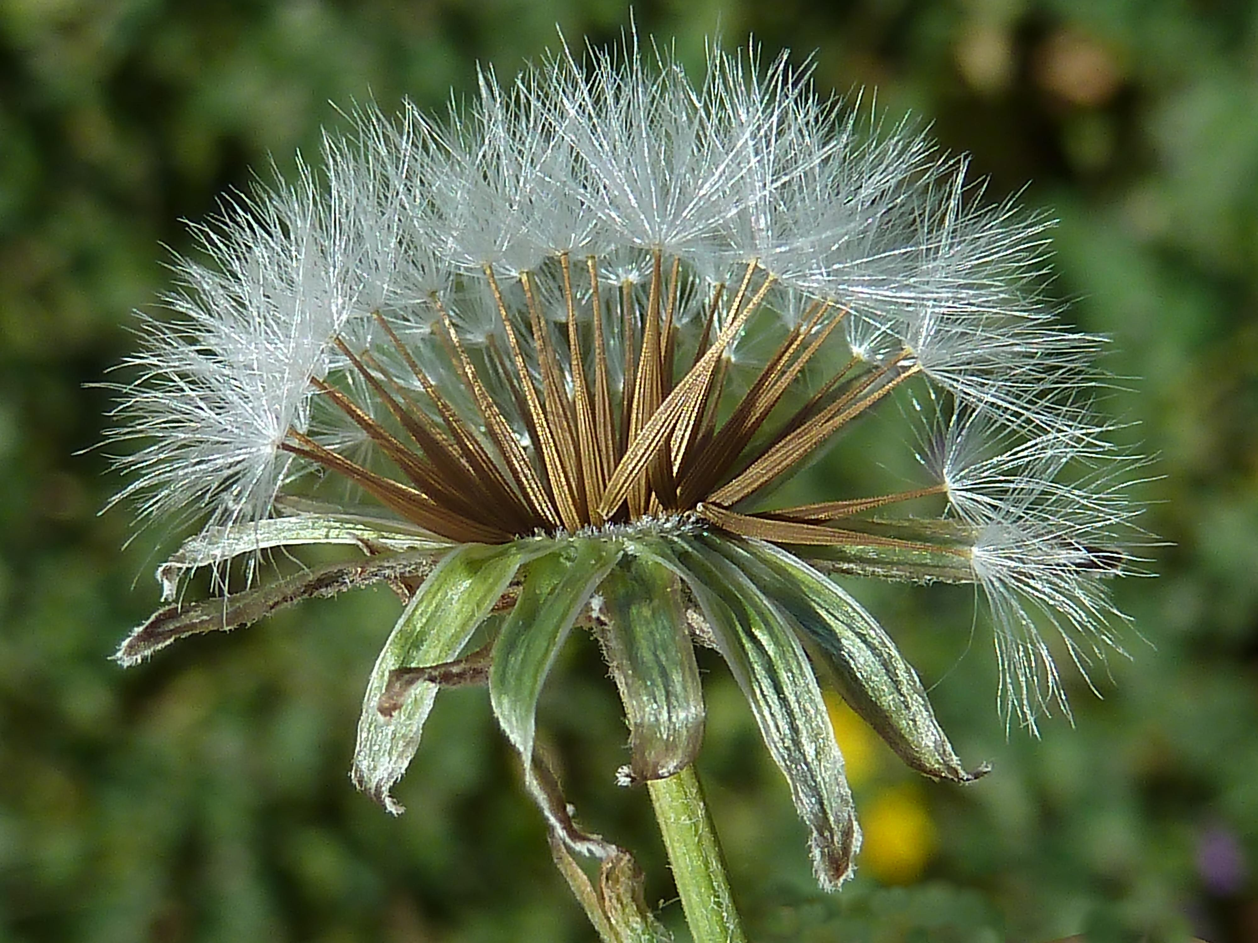 Crepis vesicaria (achicoria, escoba de hojera, lecherina) - Capítulo en fructificación. - Camino de la Azarbe de Patricio, Albatera (Provincia de Alicante, España).